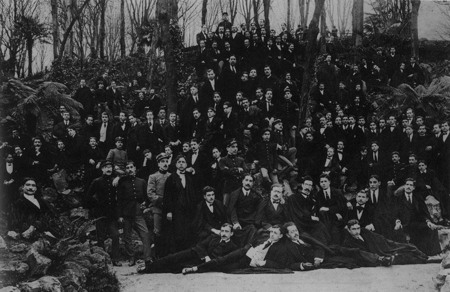 O Orpheon Académico do Porto de 1912